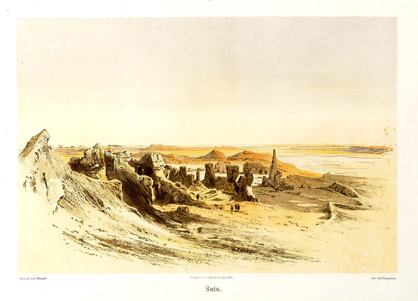 Denkmaeler aus Aegypten und Aethiopien nach den Zeichnungen der von Seiner Majestät dem Koenige von Preussen, Friedrich Wilhelm IV., nach diesen Ländern gesendeten, und in den Jahren 1842–1845 ausgeführten wissenschaftlichen Expedition auf Befehl Seiner Majestät